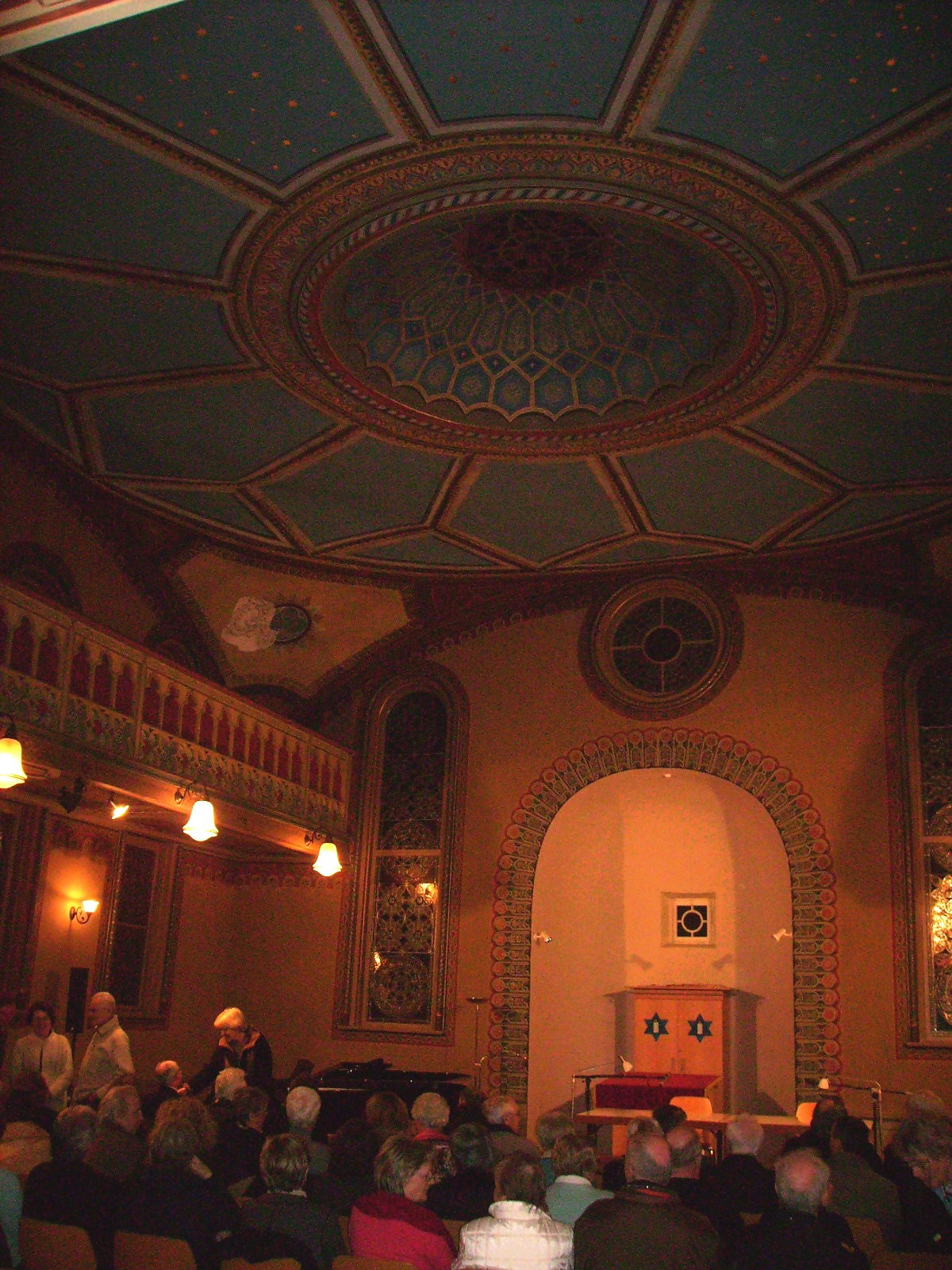 Synagoge (Hechingen) am 2. März 2009